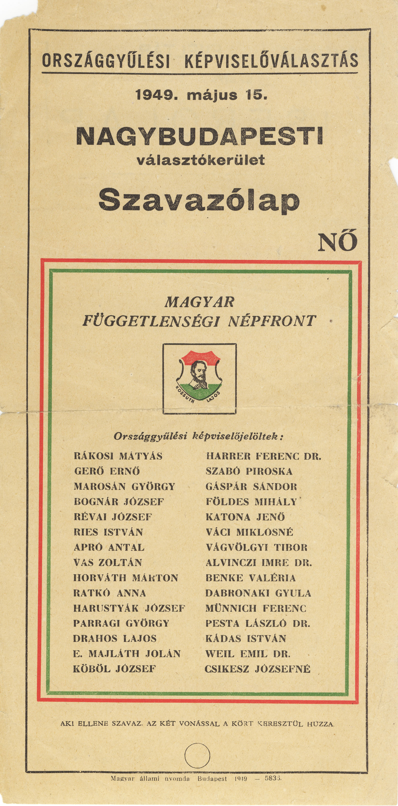 Országgyűlési képviselő-választás szavazólapja 1949. május 15-én